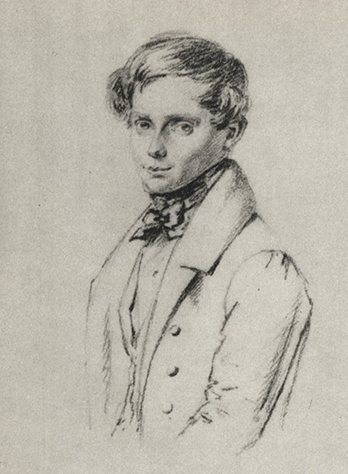 Carl August Hagberg (1810-1864)